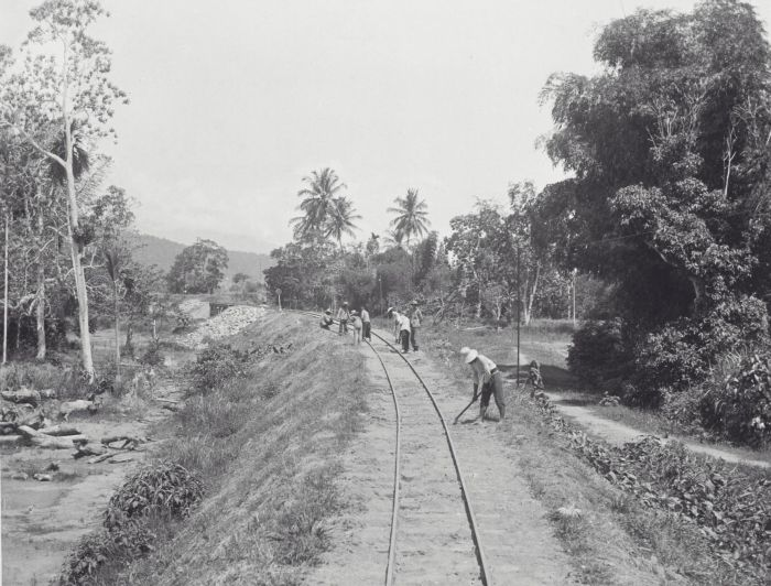 foto. De Atjeh-spoorlijn